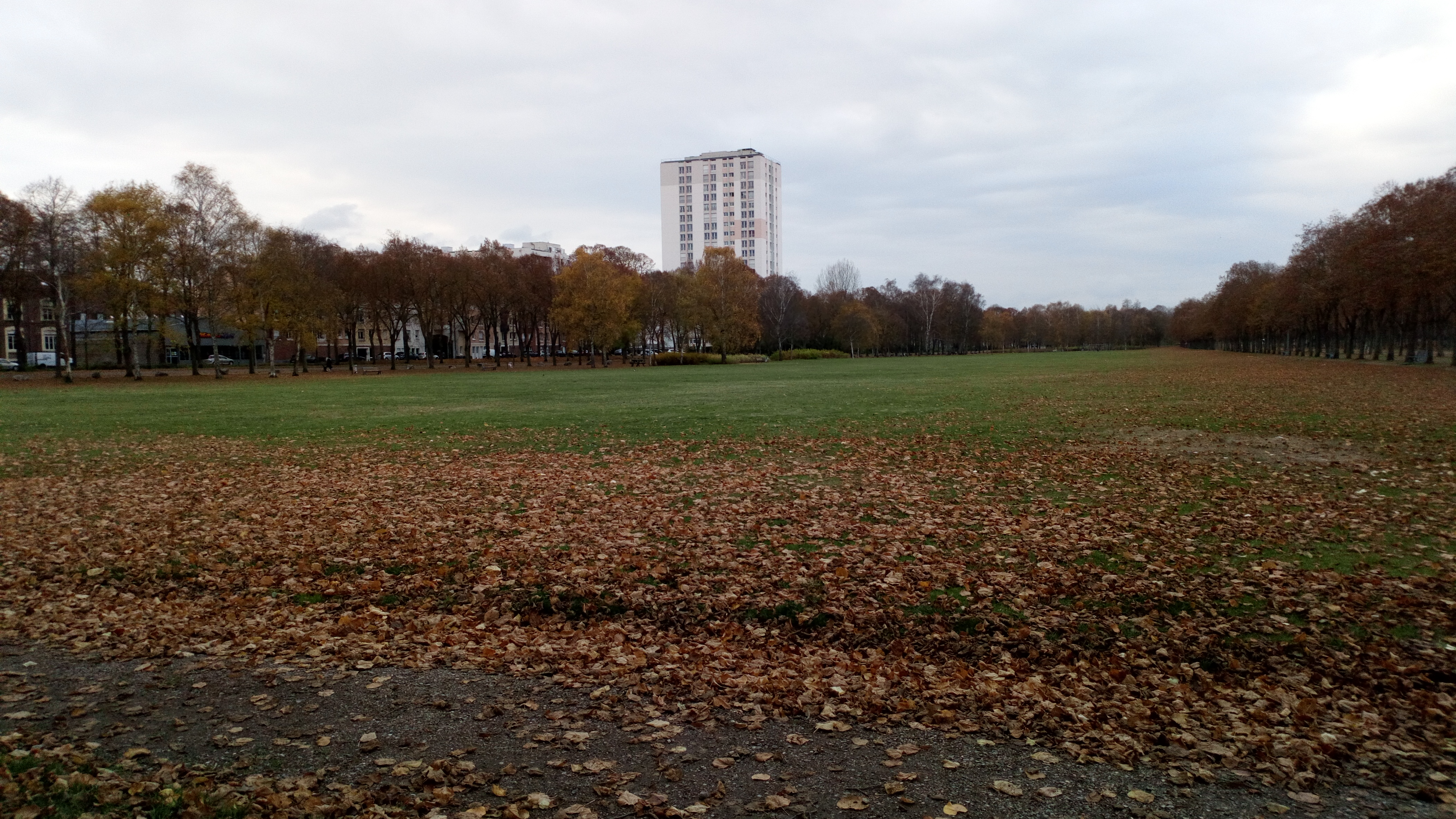 Parc de la Hotoie 10